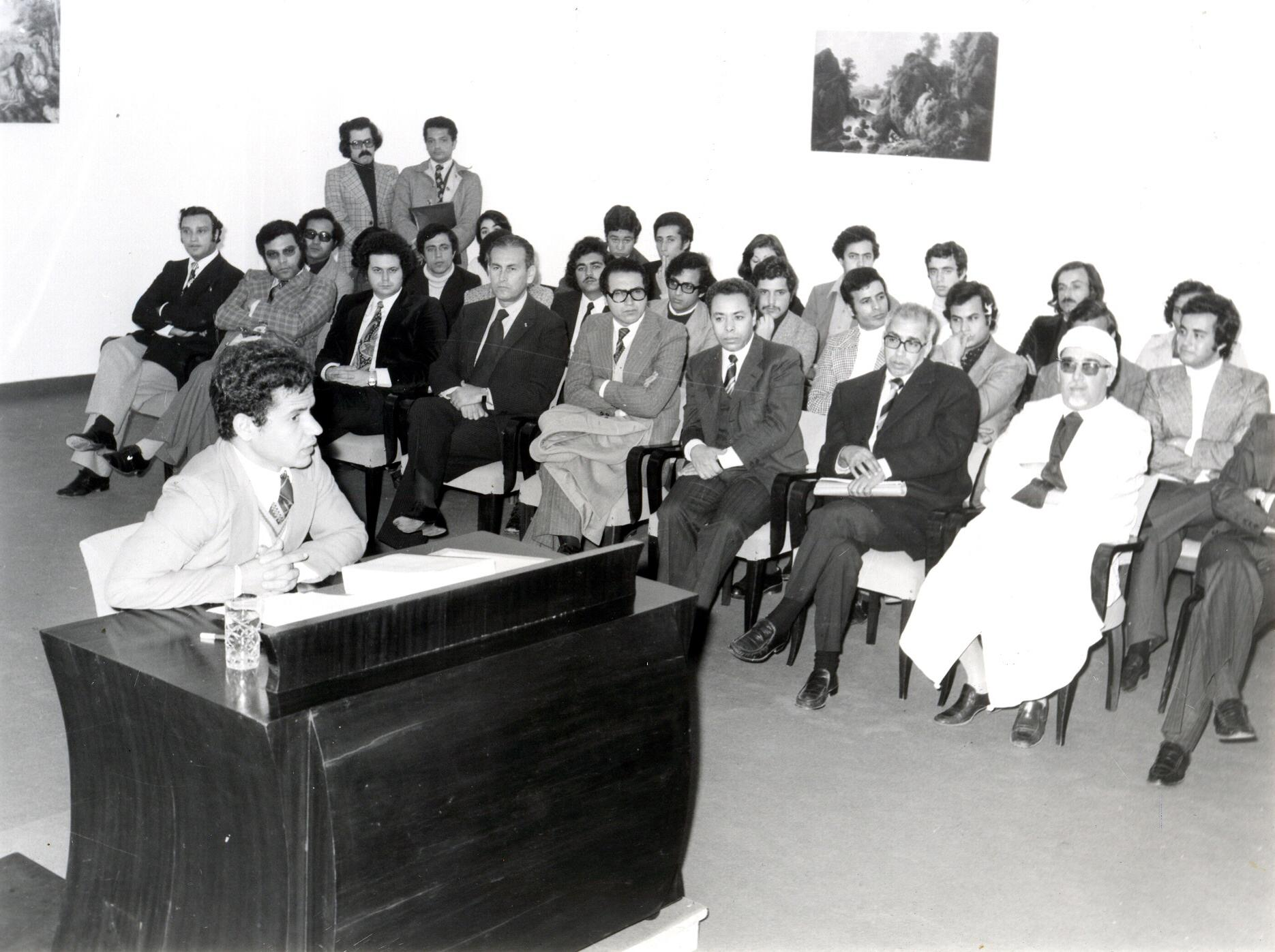 Doctorat de M. Sadok Chaabane